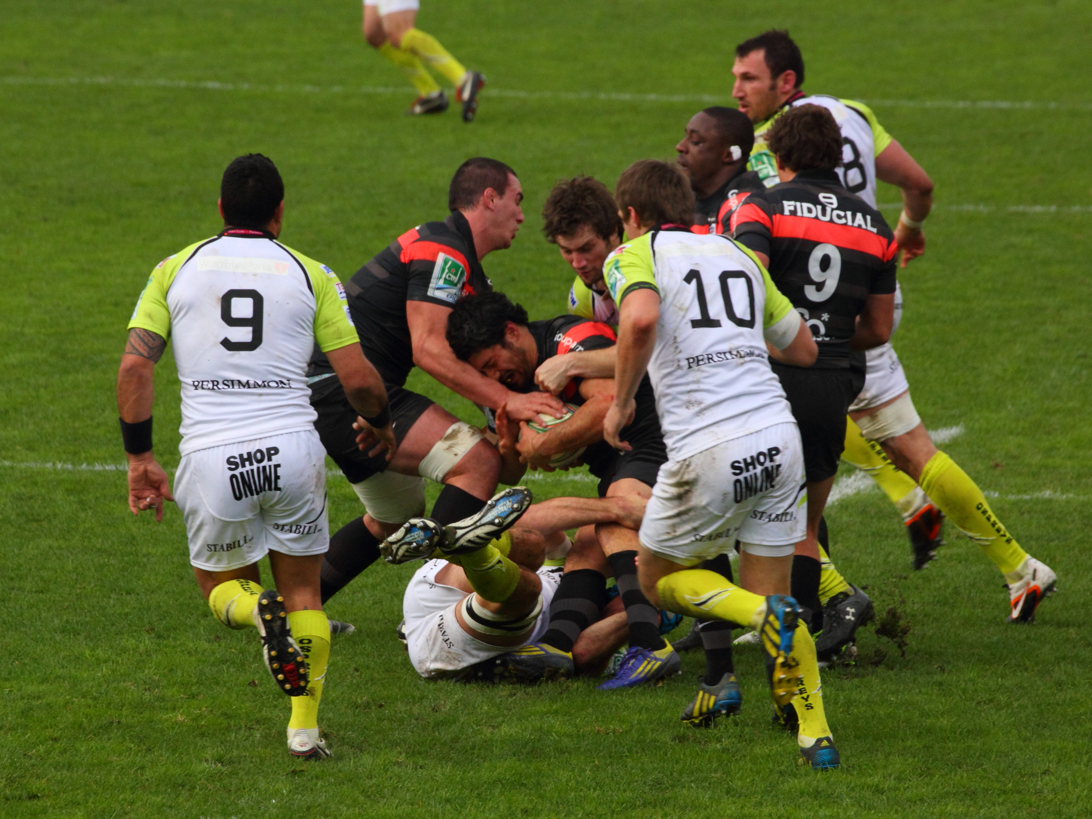 Heineken Cup 2012-2013 — 8 décembre 2012, Stade Ernest Wallon. Match between: Stade toulousain — Ospreys